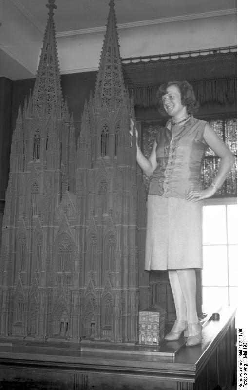 Das Original-Modell des Kölner Domes! Dieses naturgetreue Originalmodell des Kölner Domes, zu dessen Bau 8 Jahre gebraucht wurden, ist aus Holz hergestellt und hat eine Höhe von 2,52 m sowie eine Breite von 1,47 m. Mit mathematischer Genauigkeit hat der Hersteller Karl Schropp in Köln a/Rh. die kleinsten Ornamente, Säulen, Hallen, Bogen, Gänge, Fenster, Statuen und die 5000 Türmchen vollendet. Blick auf das Original-Modell des Kölner Domes, zu dessen Bau 8 Jahre gebraucht wurden.